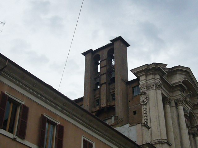 Roma, piazza di Campitelli, campanile a vela di S. Maria in Portico.